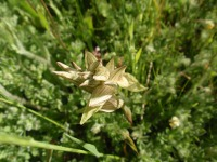 serapia